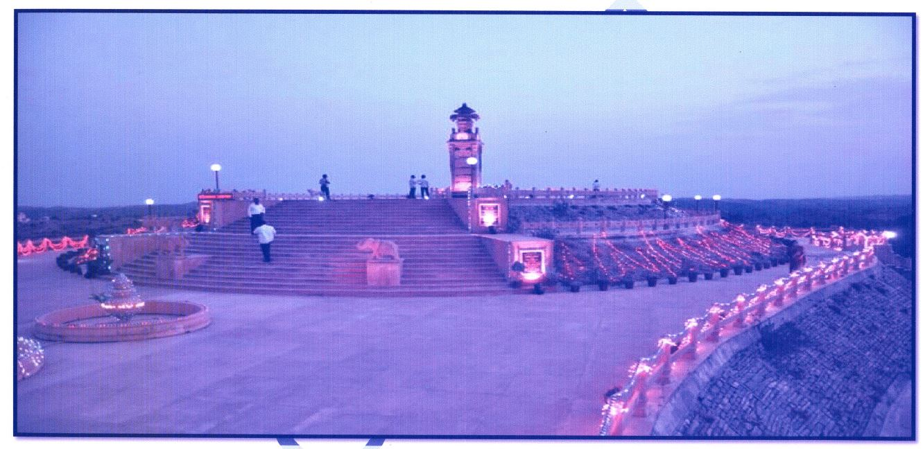 टॉडगढ